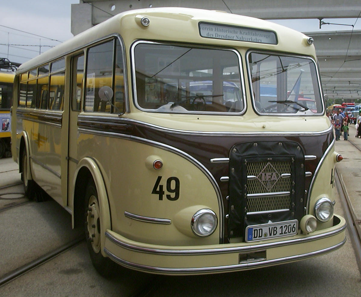 IFA H6B/S (Stadtverkehr) des Vereins Historische Kraftfahrzeuge des Dresdner Nahverkehrs